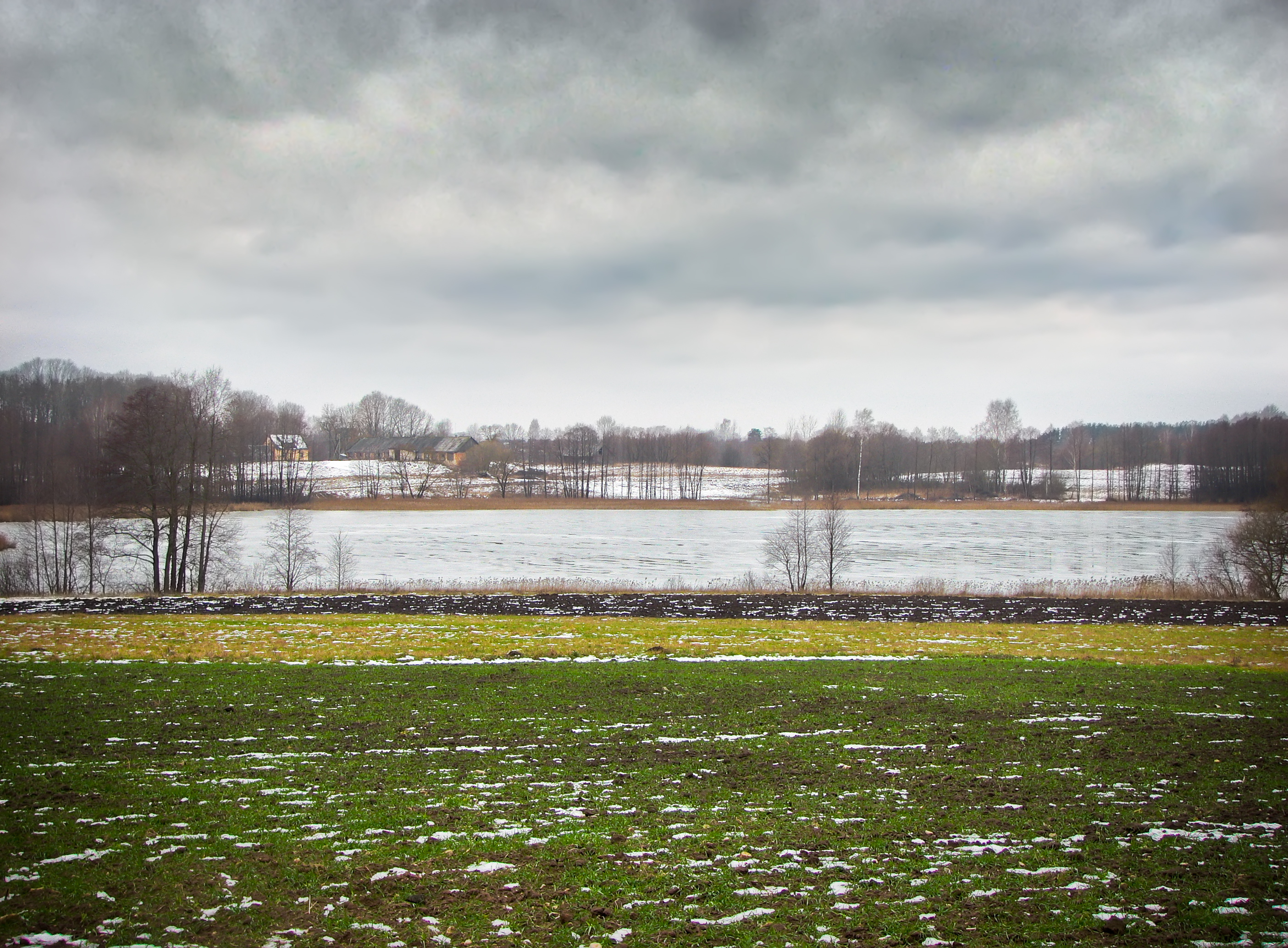 озеро Мушас